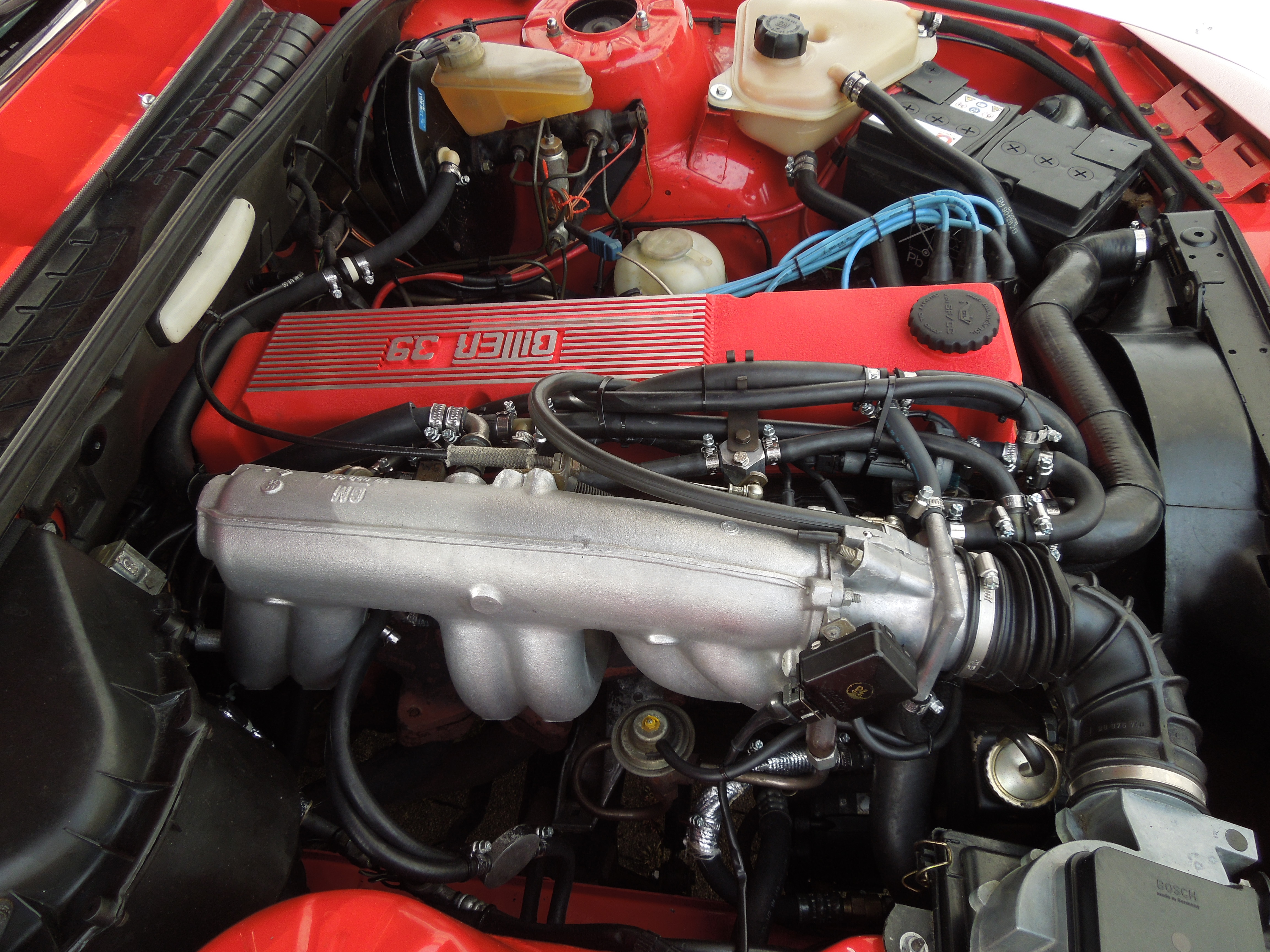 3.9l - Triebwerk